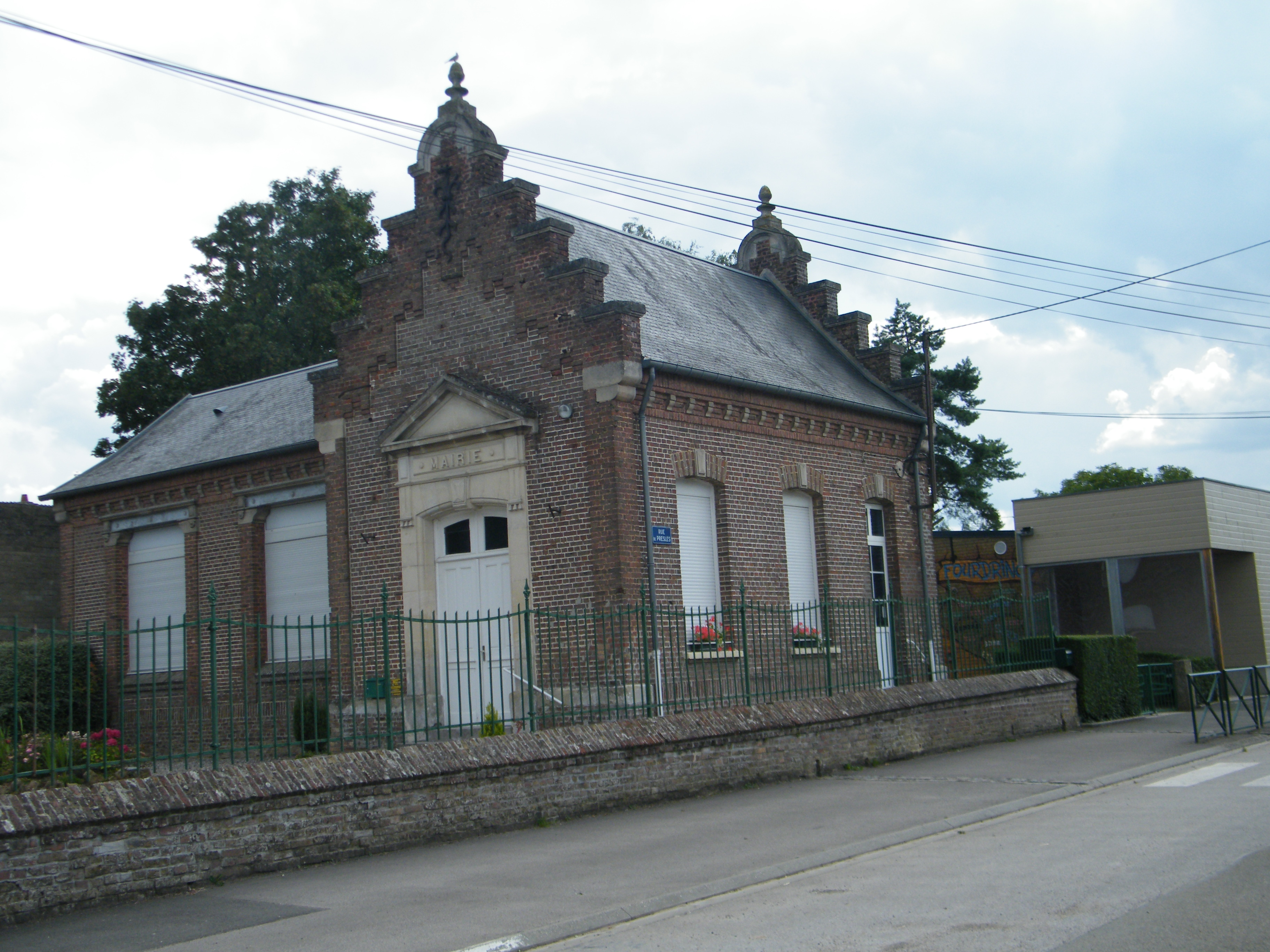 école.